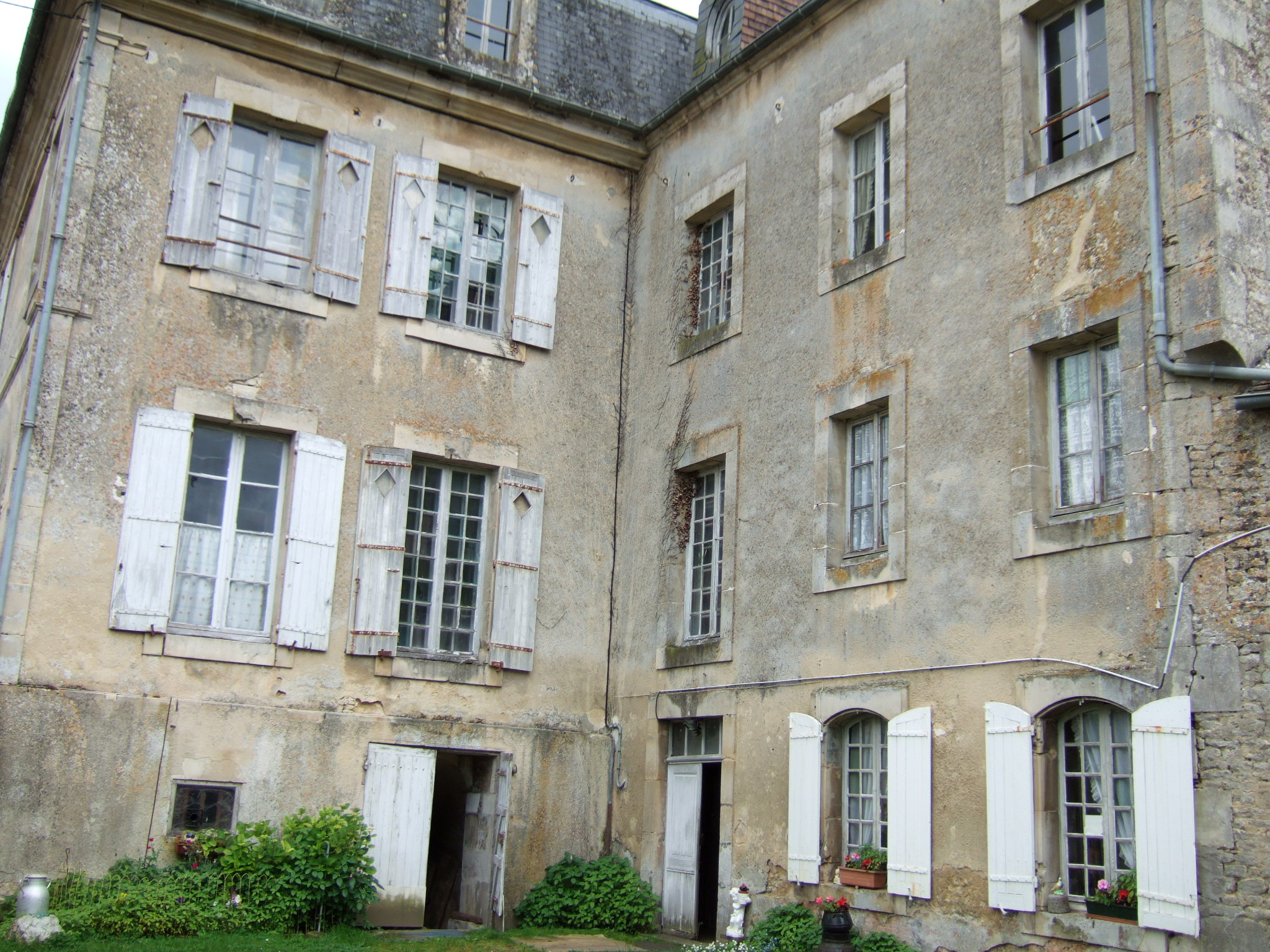 En demi sous-sol vous voyez l'entrée de la cave, sur la gauche du bâtiment se trouve le proche d'entrée de la cour, et à droite l'hôtel particulier est prolongé par une grange.